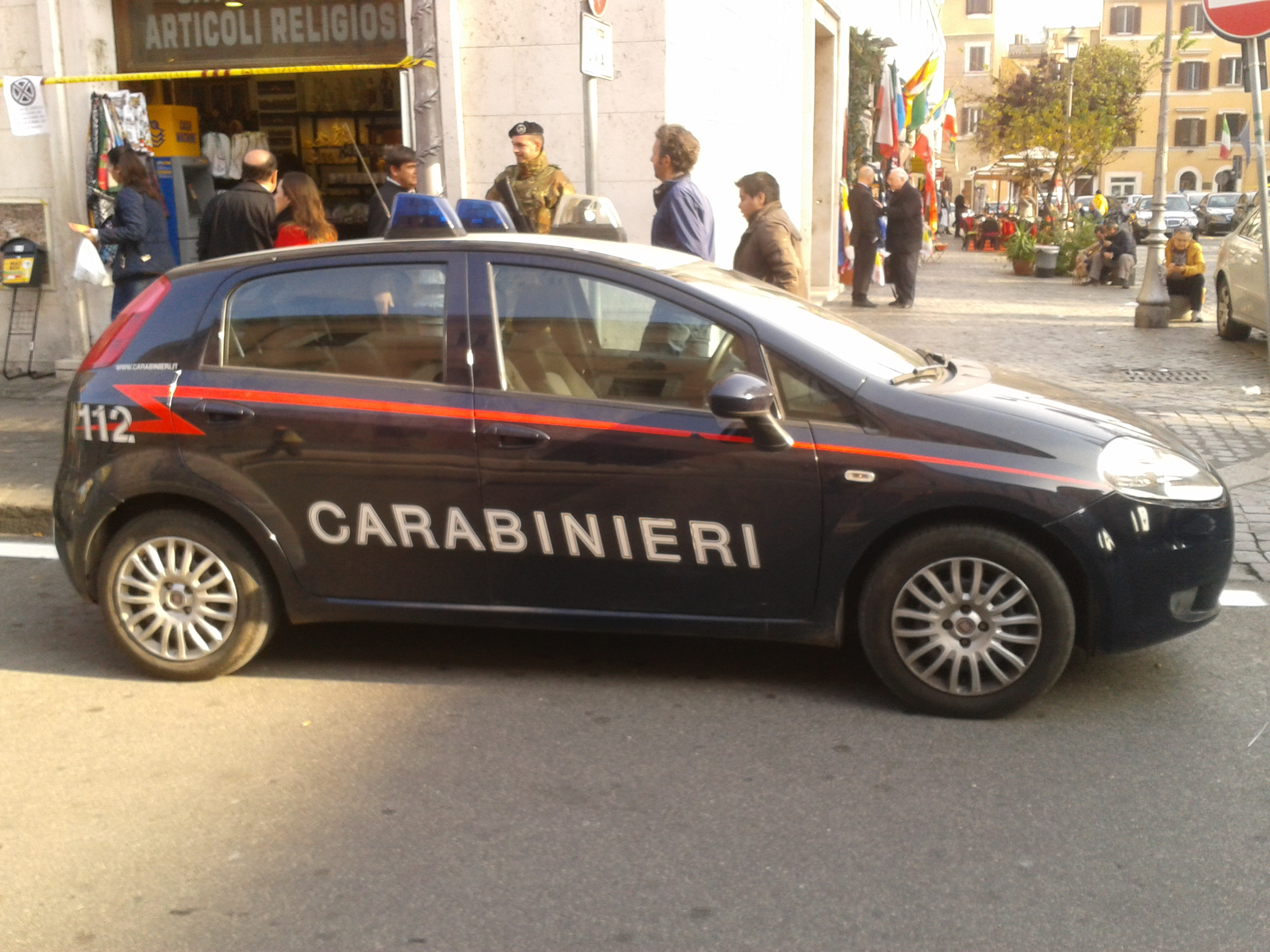 Vehiculo de la policia italiana